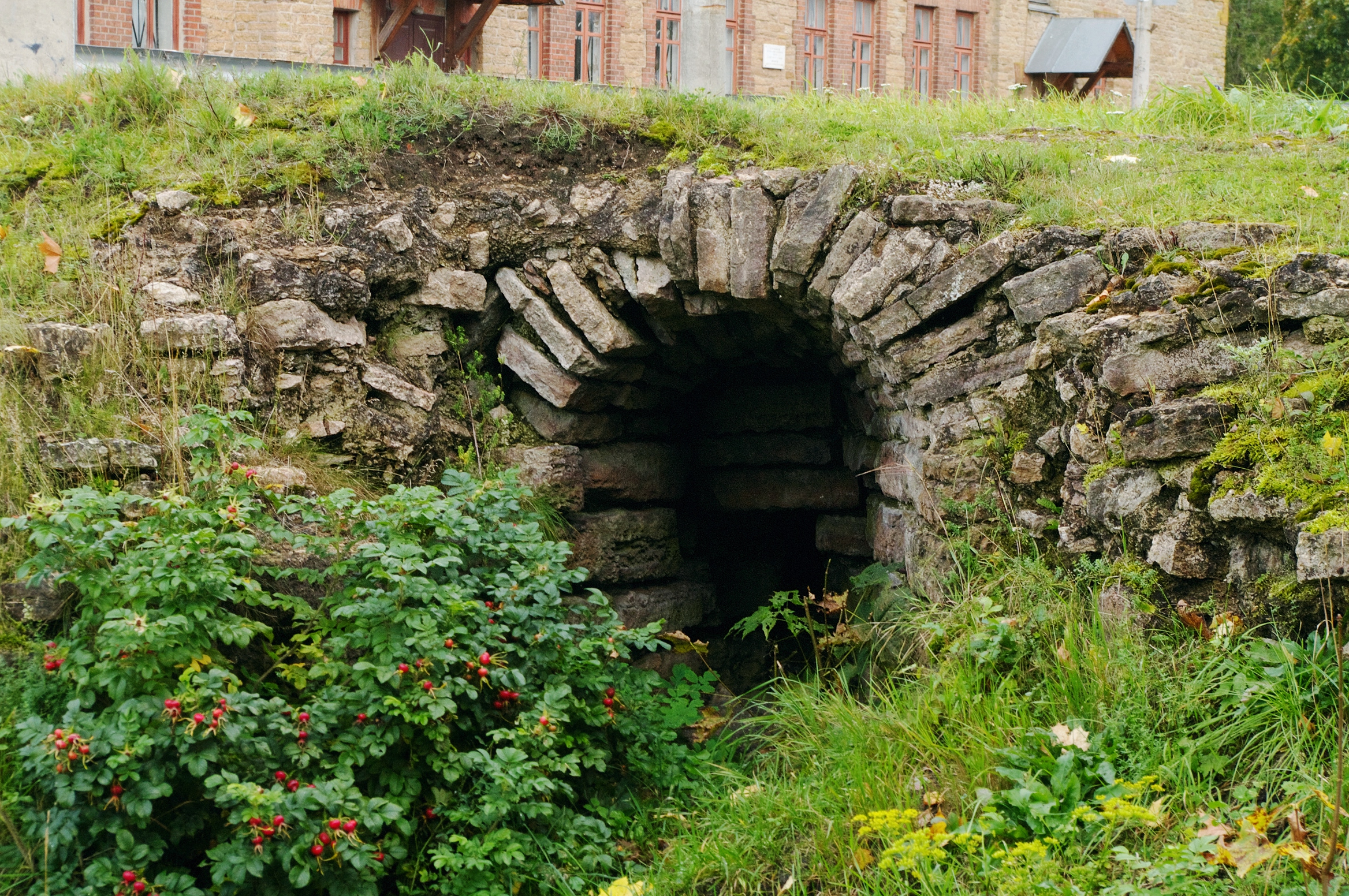 Остатки угловой башни, крепости Ям. Бойница подошвенного боя.